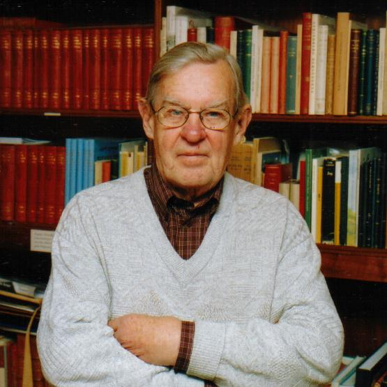 Erik Lundberg, svenska författare (Foto: Tom Manhof)